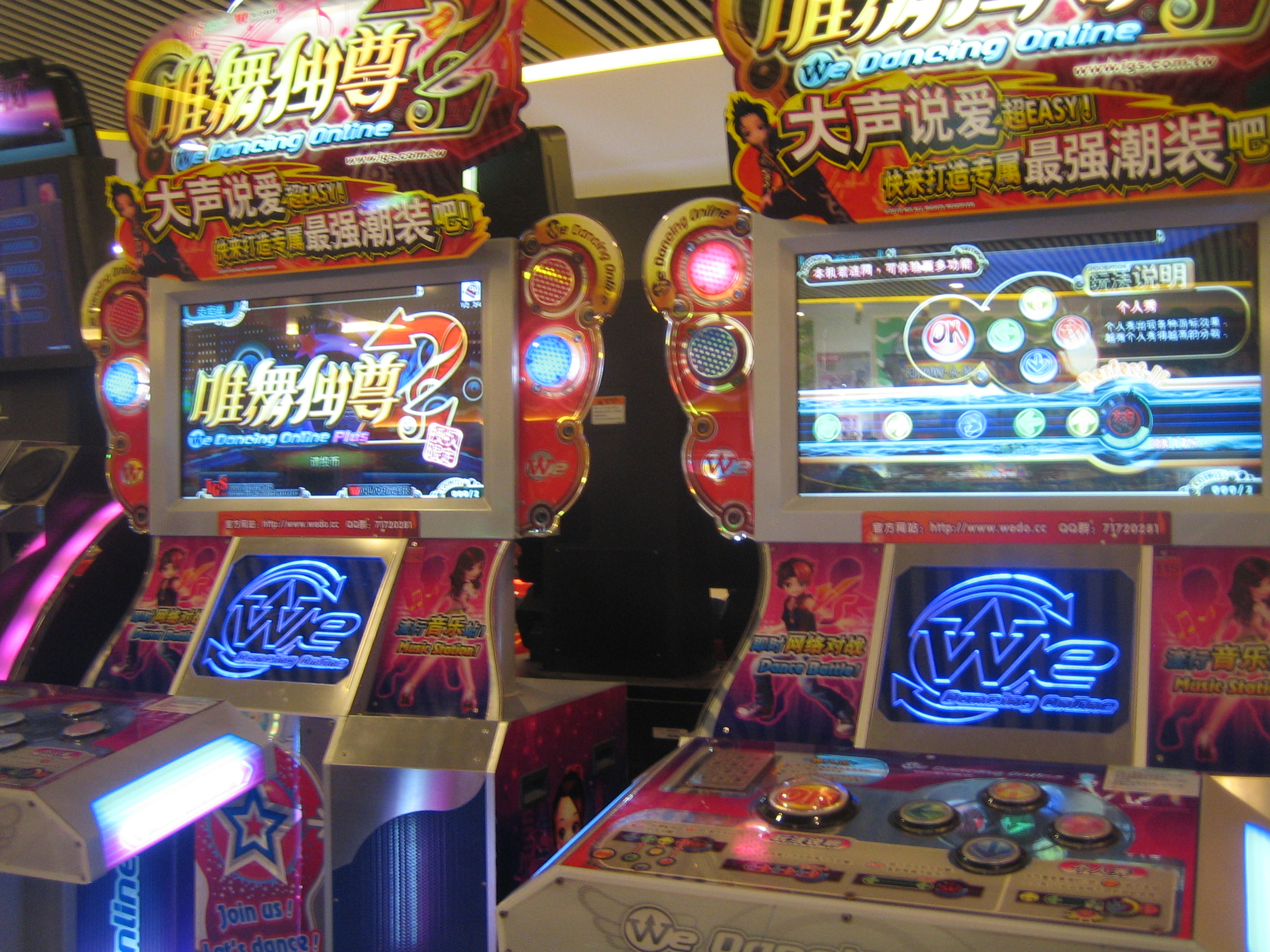 中文（中国大陆）: 唯舞独尊中国大陆版机台